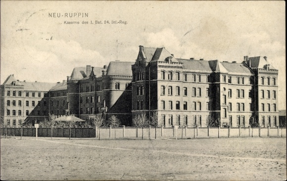 Königstor-Kaserne, I. Bataillon, Infanterie-Regiment Nr. 24 in Neuruppin, 1907 gelaufene Postkarte